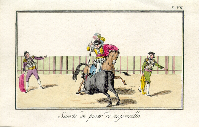 Delgado y Gálvez, José: Tauromaquia o arte de torear á caballo y á pie